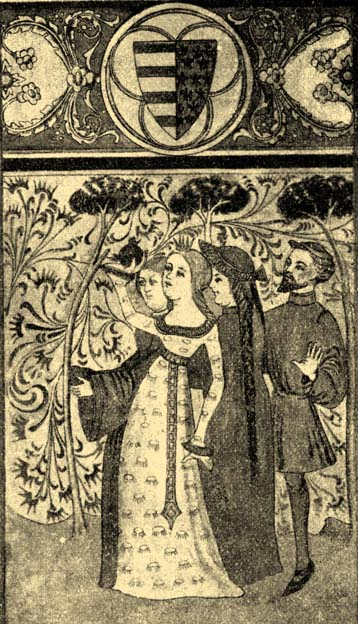 Marie Uherská